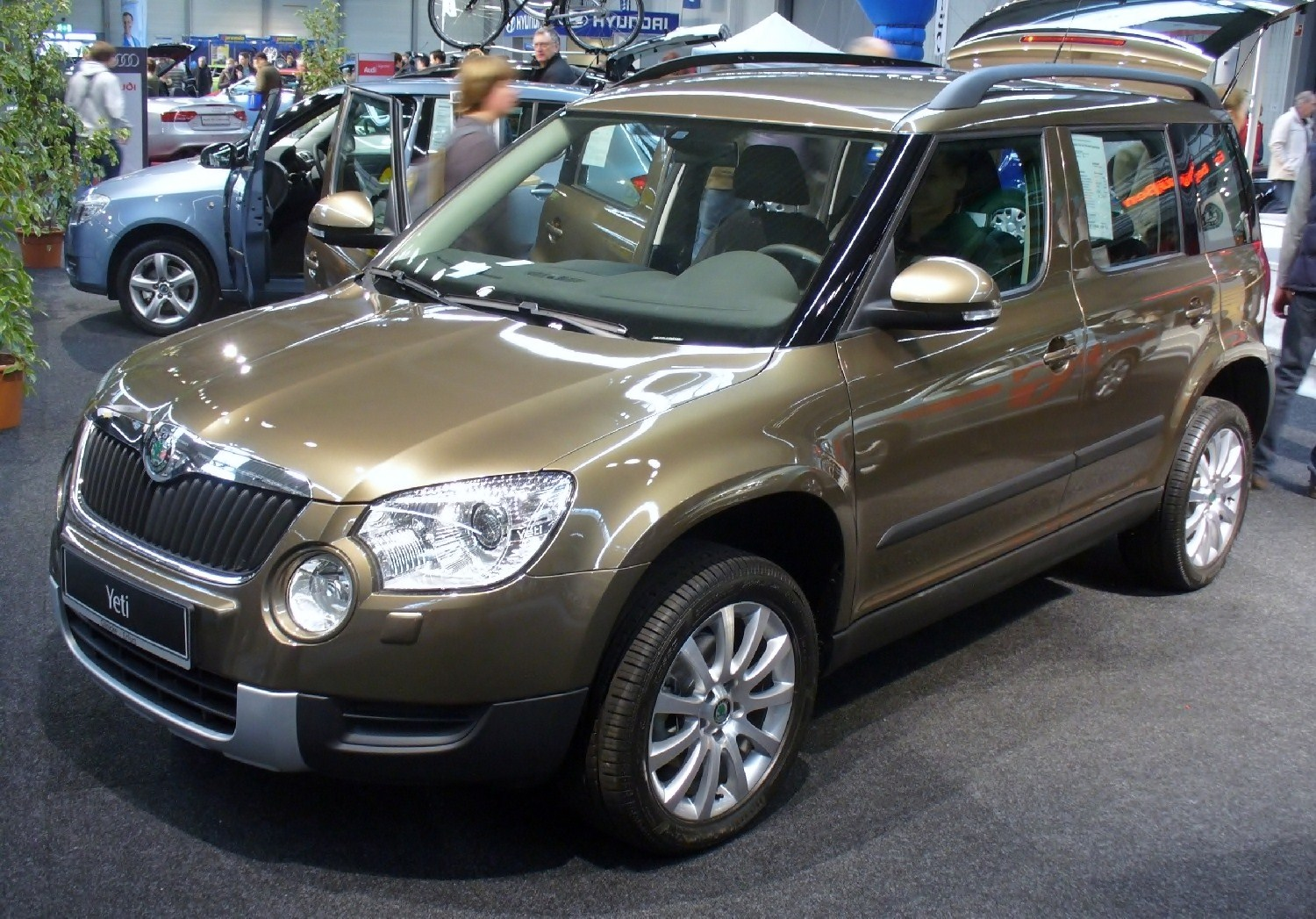 Škoda Yeti